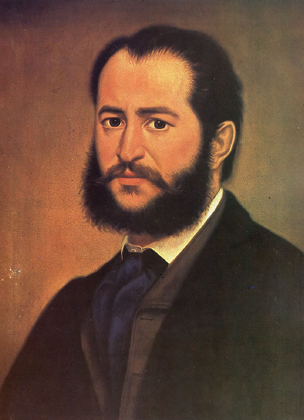 Nikolai Pavlovich - self-portrait